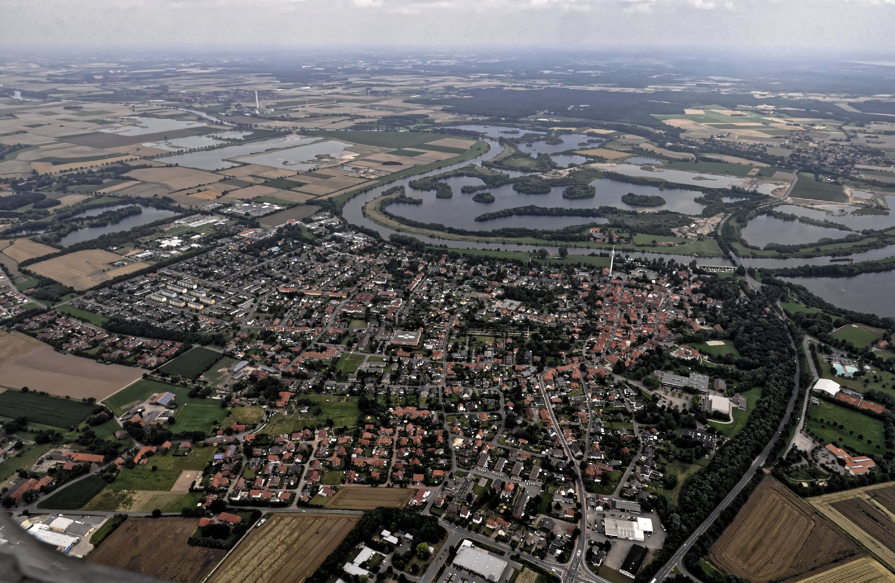 Bilder vom Flug Nordholz-Hammelburg 2015: Blick auf Stolzenau (vorn) und, jenseits der Weser, das Naturschutzgebiet Domäne Stolzenau/Leese in der Gemarkung von Leese. Leese am rechten Bildrand.